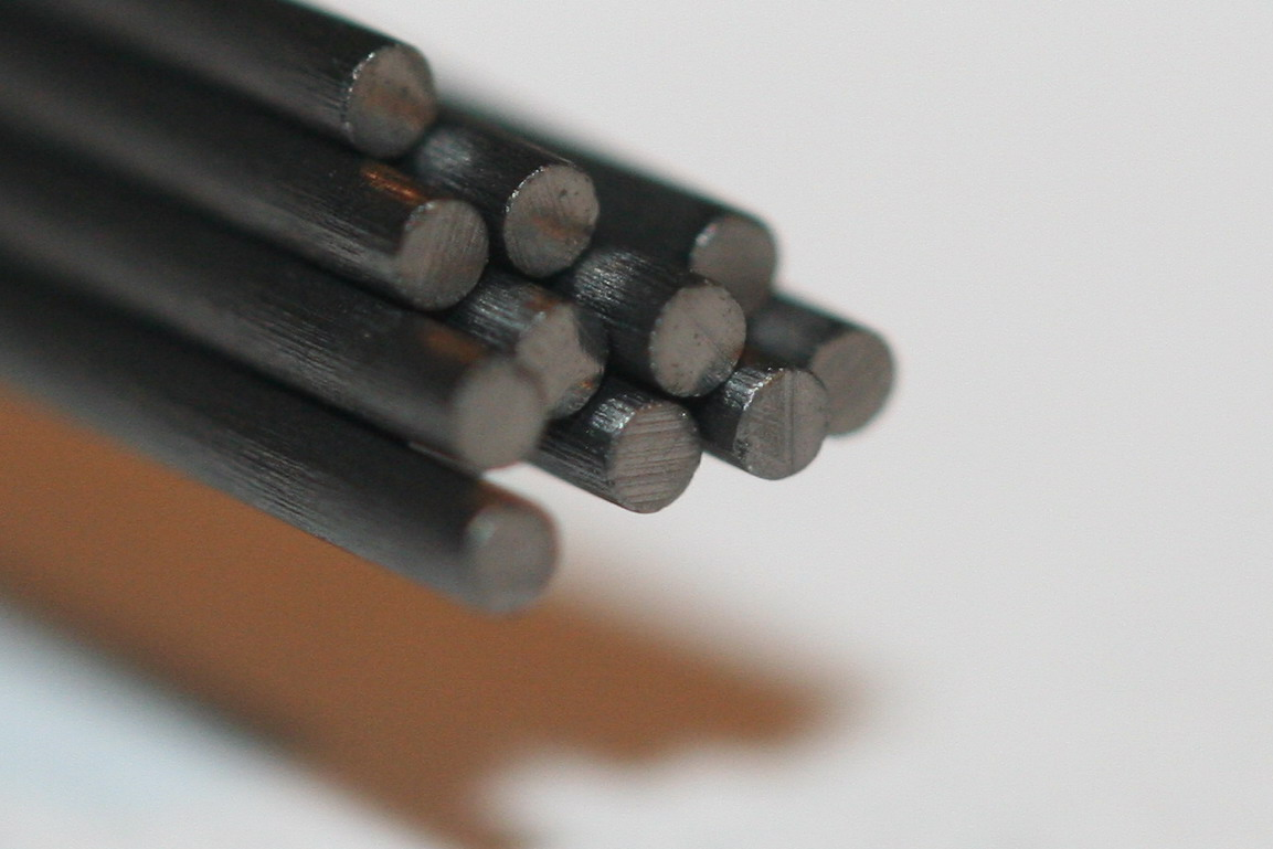 Mechanical pencil